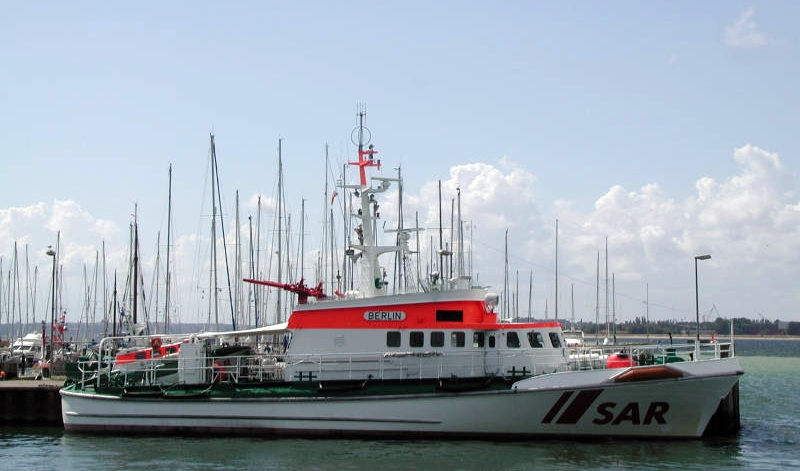 Seenotrettungskreuzer Berlin Außenansicht